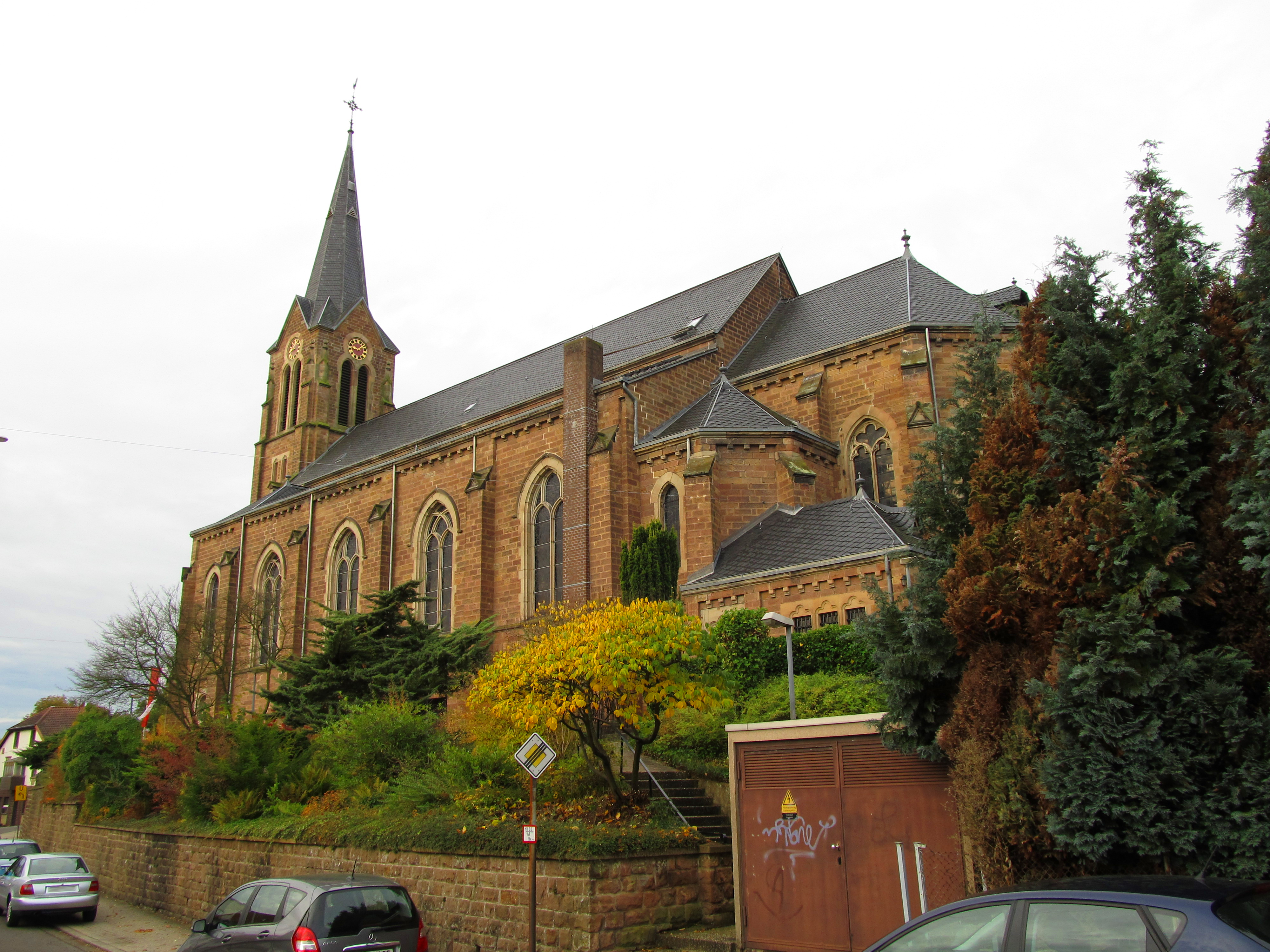 Die katholische Pfarrkirche Herz Jesu in Köllerbach, einem Stadtteil von Püttlingen, Saarland